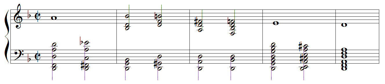 Anton Reicha - sujet de la fugue n°14 des 36 fugues, op.36